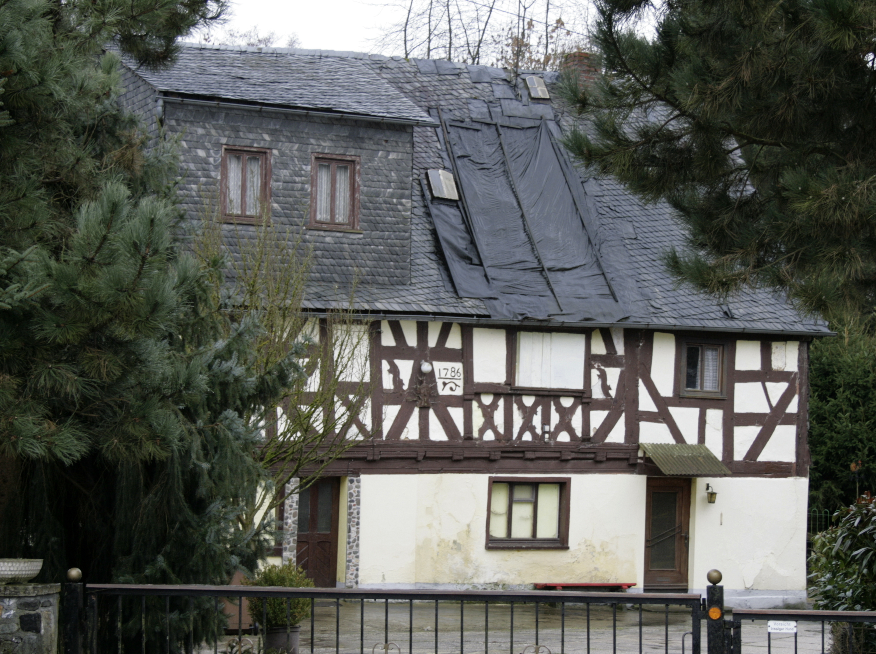 Mühle bei Heuchelheim, Deutschland